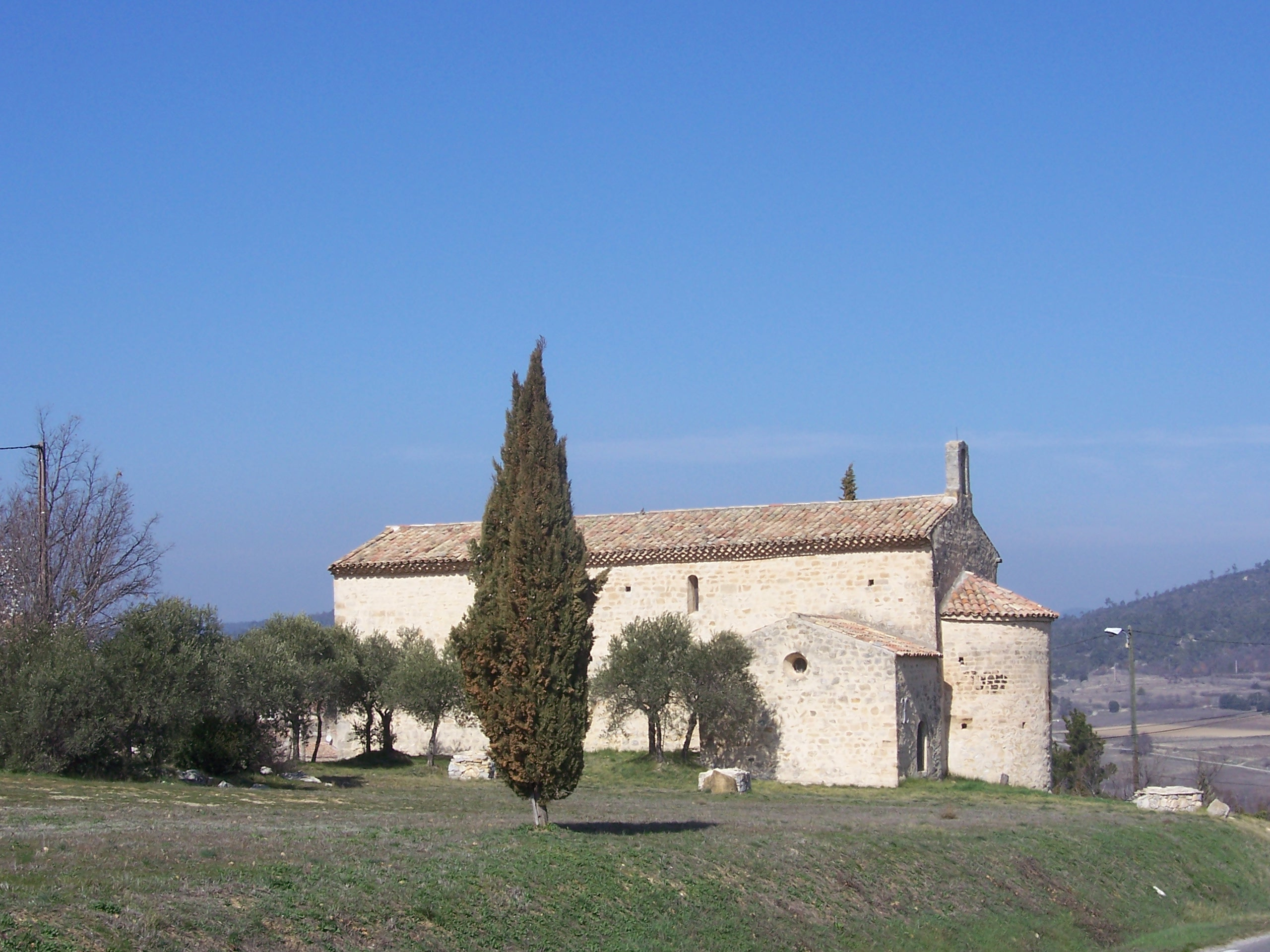 vue générale de notre dame de beauvoir